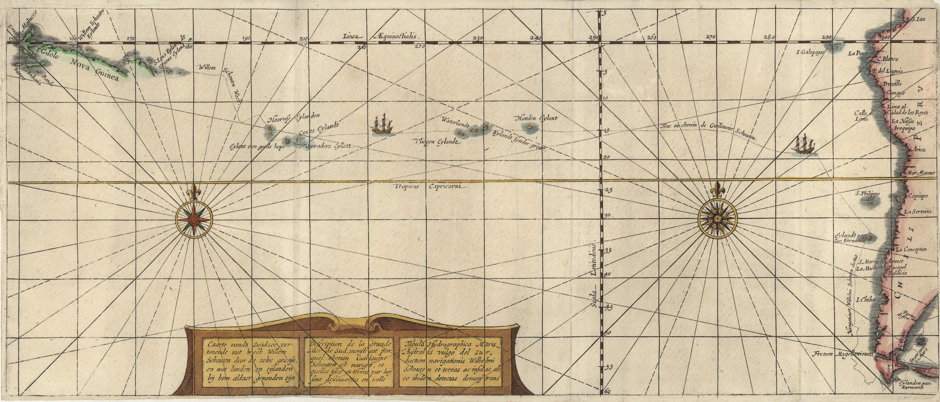 Caarte vande Zuijdzee vertonende wat wech Willem Schouten door de zelve gezeijlt en wat landen en eijlanden bij hem aldaer gevonden zijn. Kaart van de route die Le Maire en Schouten volgden vanaf Patagonie tot Ternate. Bron: National Library of Australia Oorspronkelijke bron: Het journaal van Willem Schouten. Map is from 1618